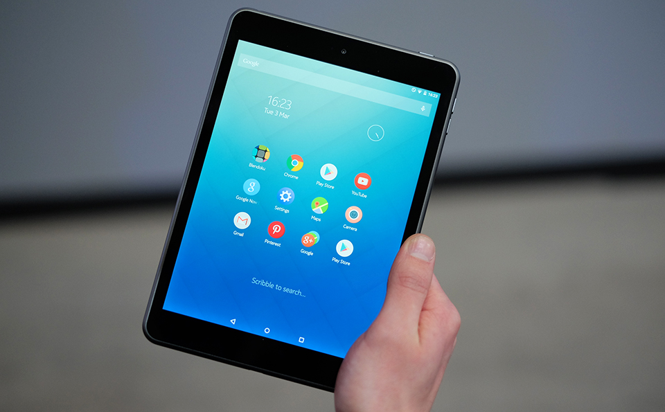 טאבלט אנדרואיד של נוקיה משנת 2016 (nokia N1 )